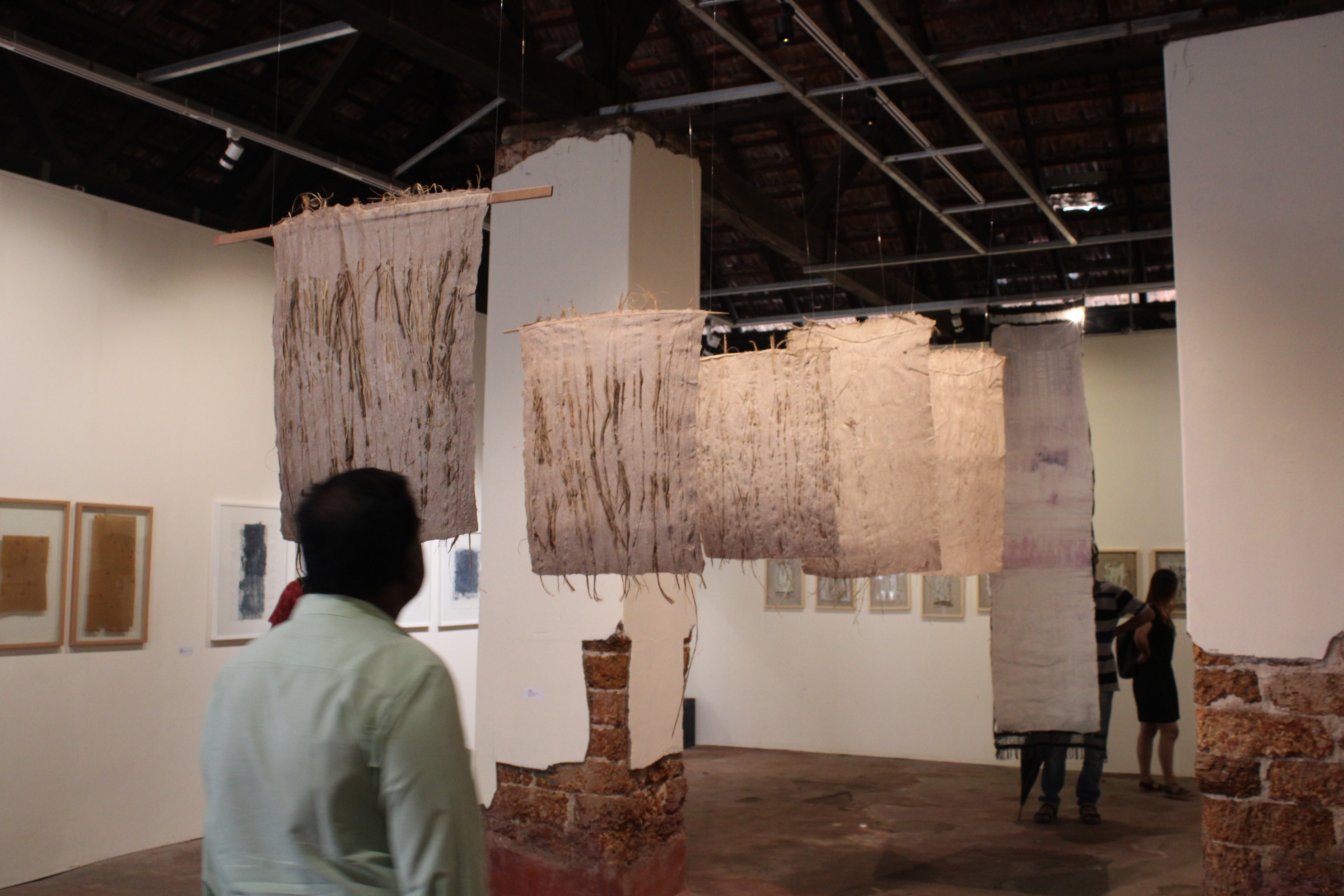 പ്രിയ രവീഷ് മെഹ്റയുടെ കൊച്ചി മുസിരിസ് ബിനലെയിലെ പ്രദർശനം കാണുന്നവർ